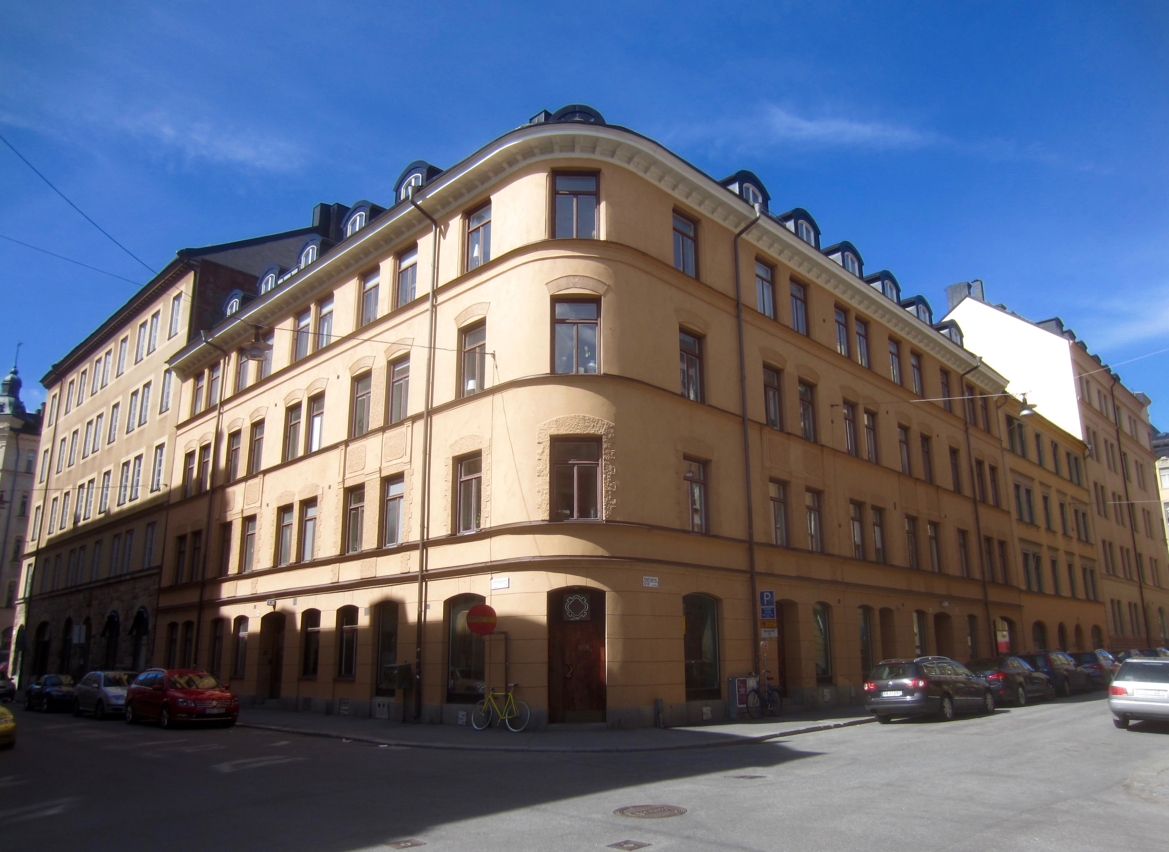 Hörnet Tyskbagargatan-Jungfrugatan i Stockholm.